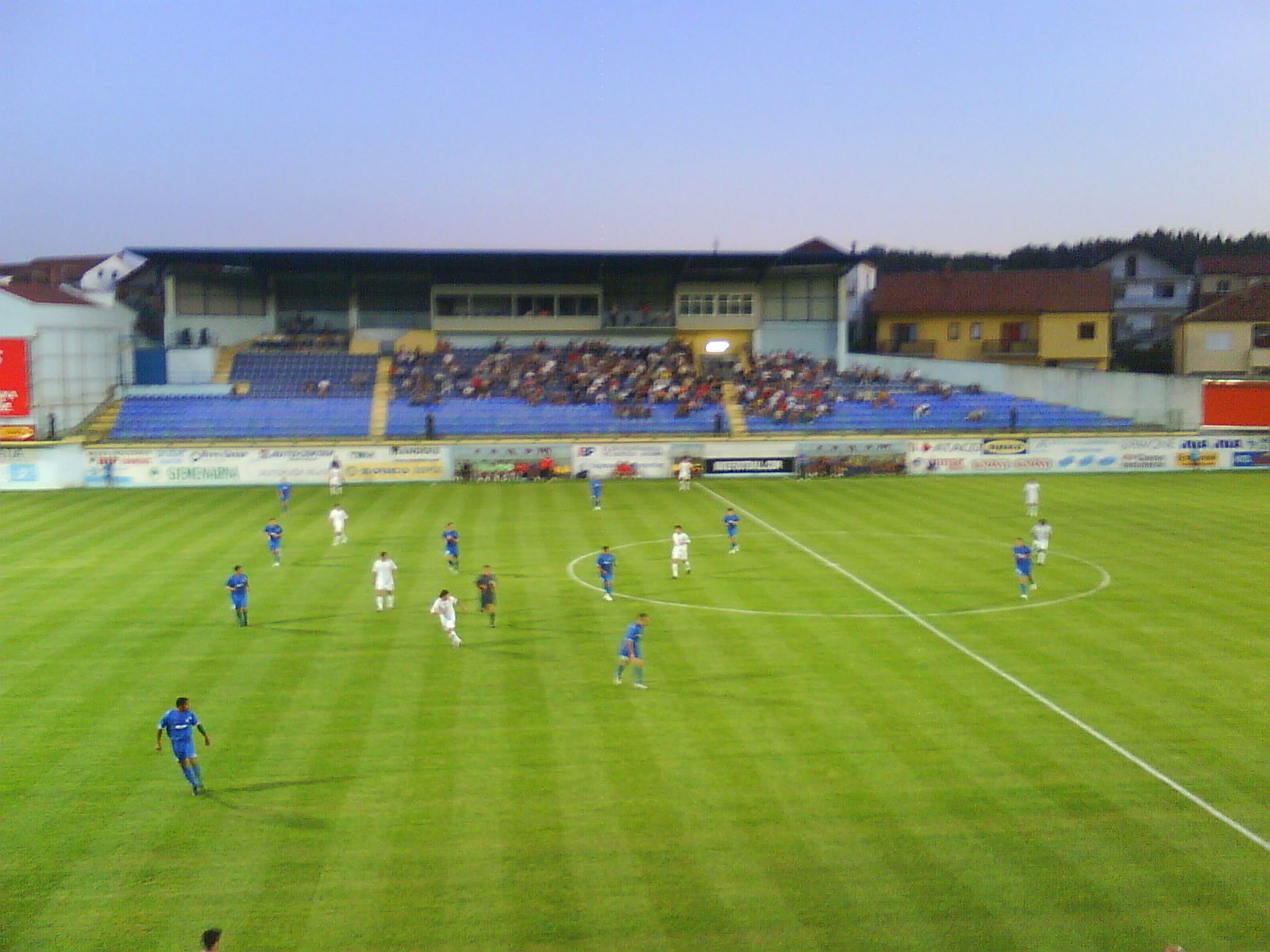 Pecara-utakmica Široki Brijeg-Banants